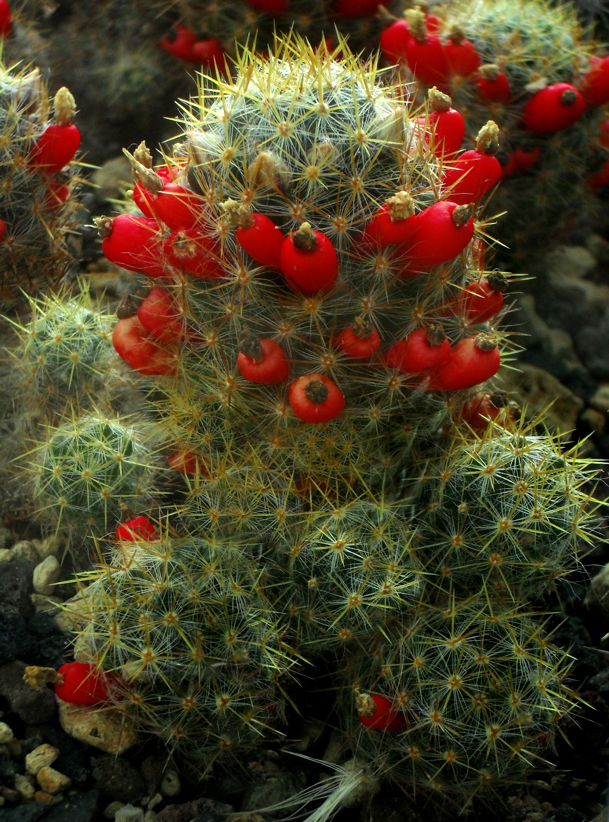 Mammillaria prolifera - Botanischer Garten Leipzig